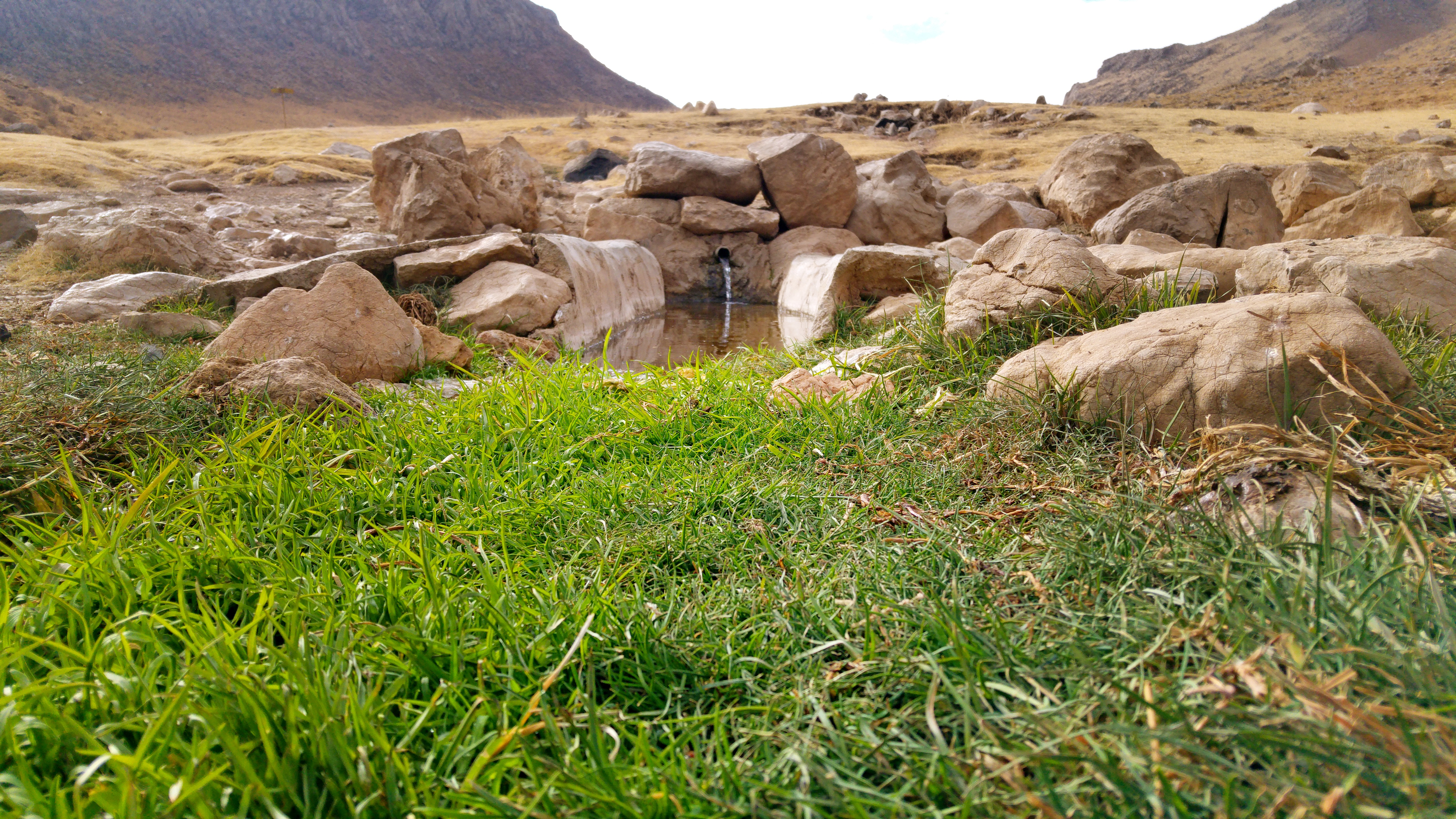 چشمه دوزری